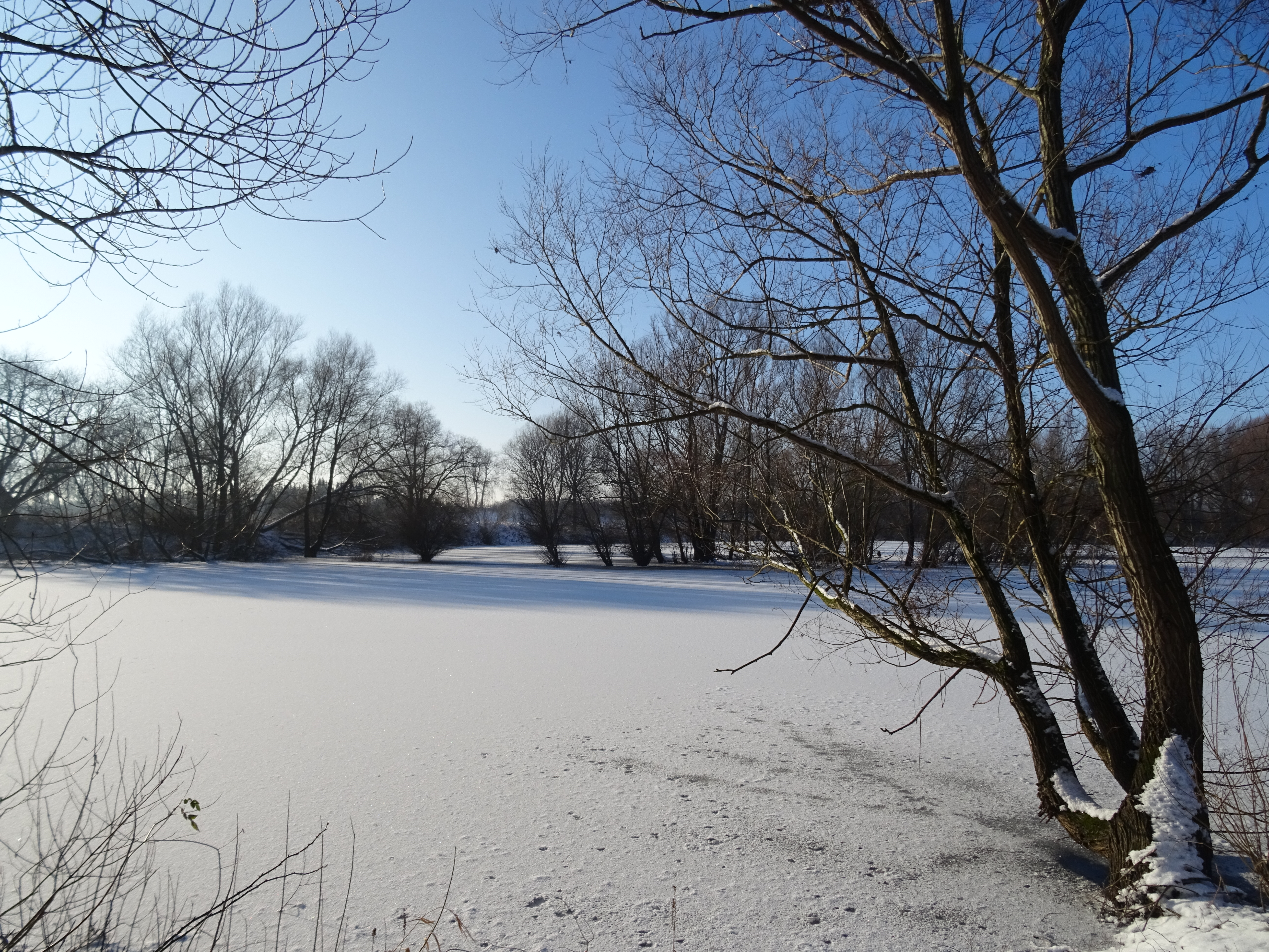 Naturschutzgebiet „Leineaue zwischen Ruthe und Koldingen“ (NSG HA 203), Winter an den Seen